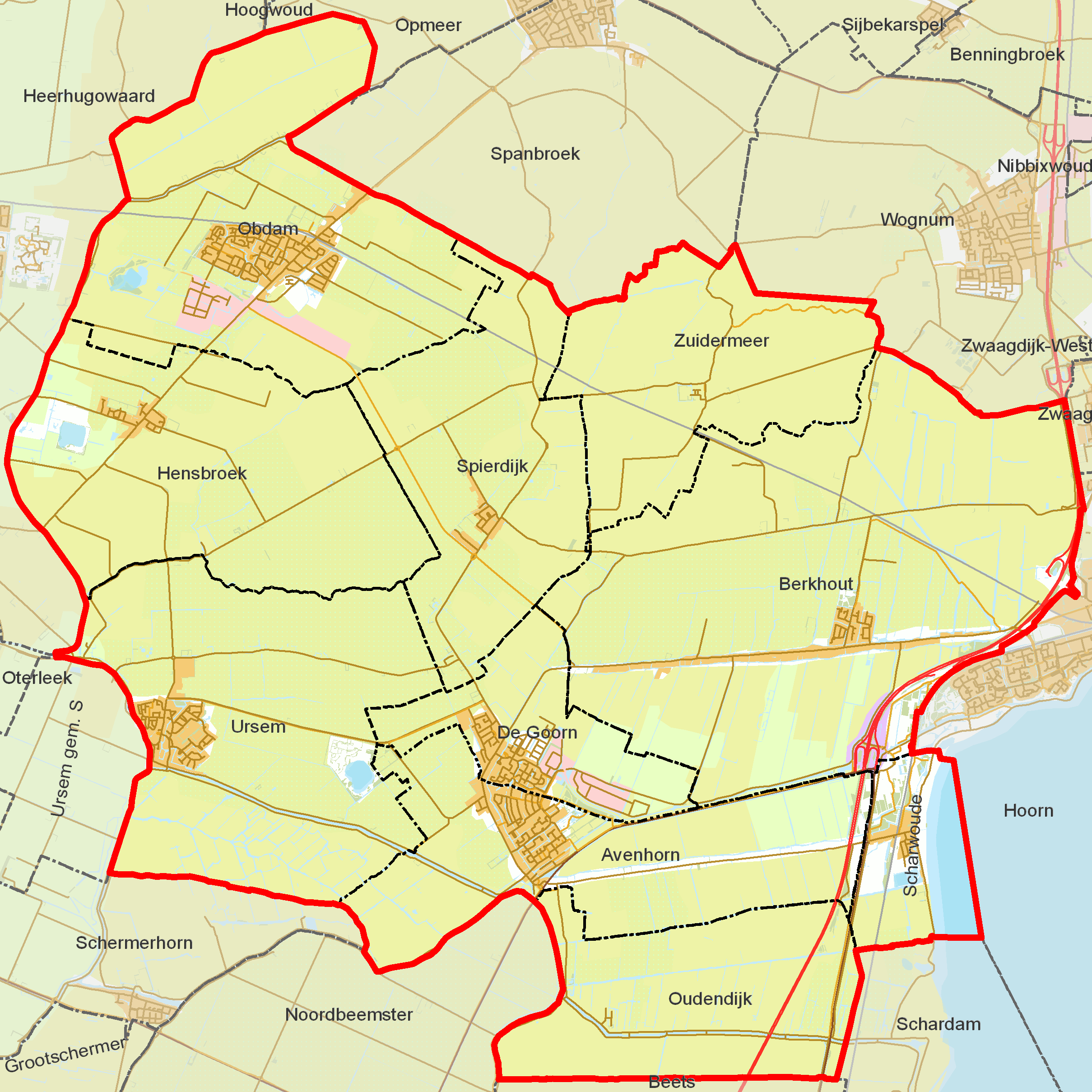 BAG woonplaatsen - Gemeente Koggenland.png